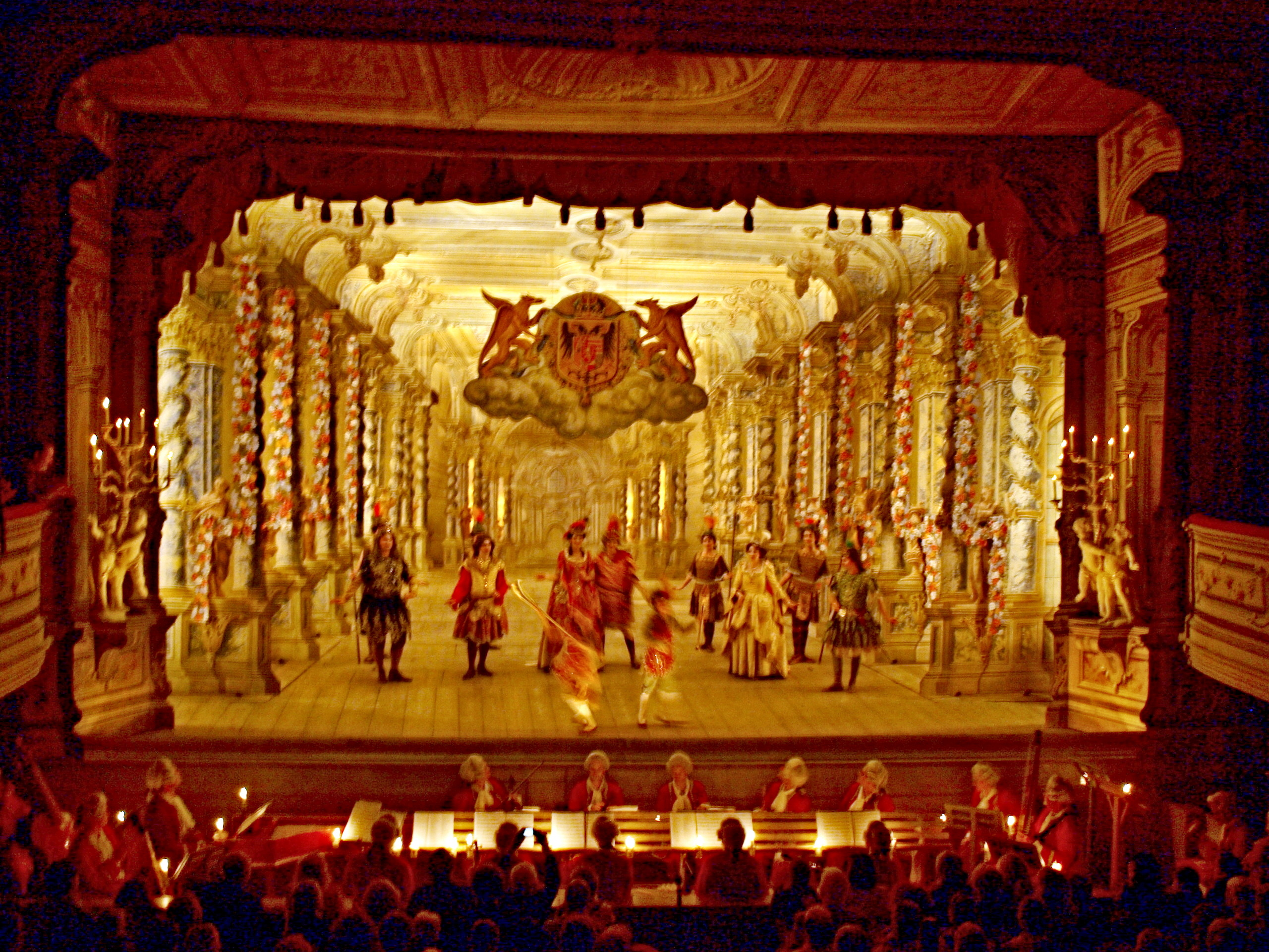 Johann Adolph Hasse: l'Ipermestra - barokní opera v Českém Krumlově